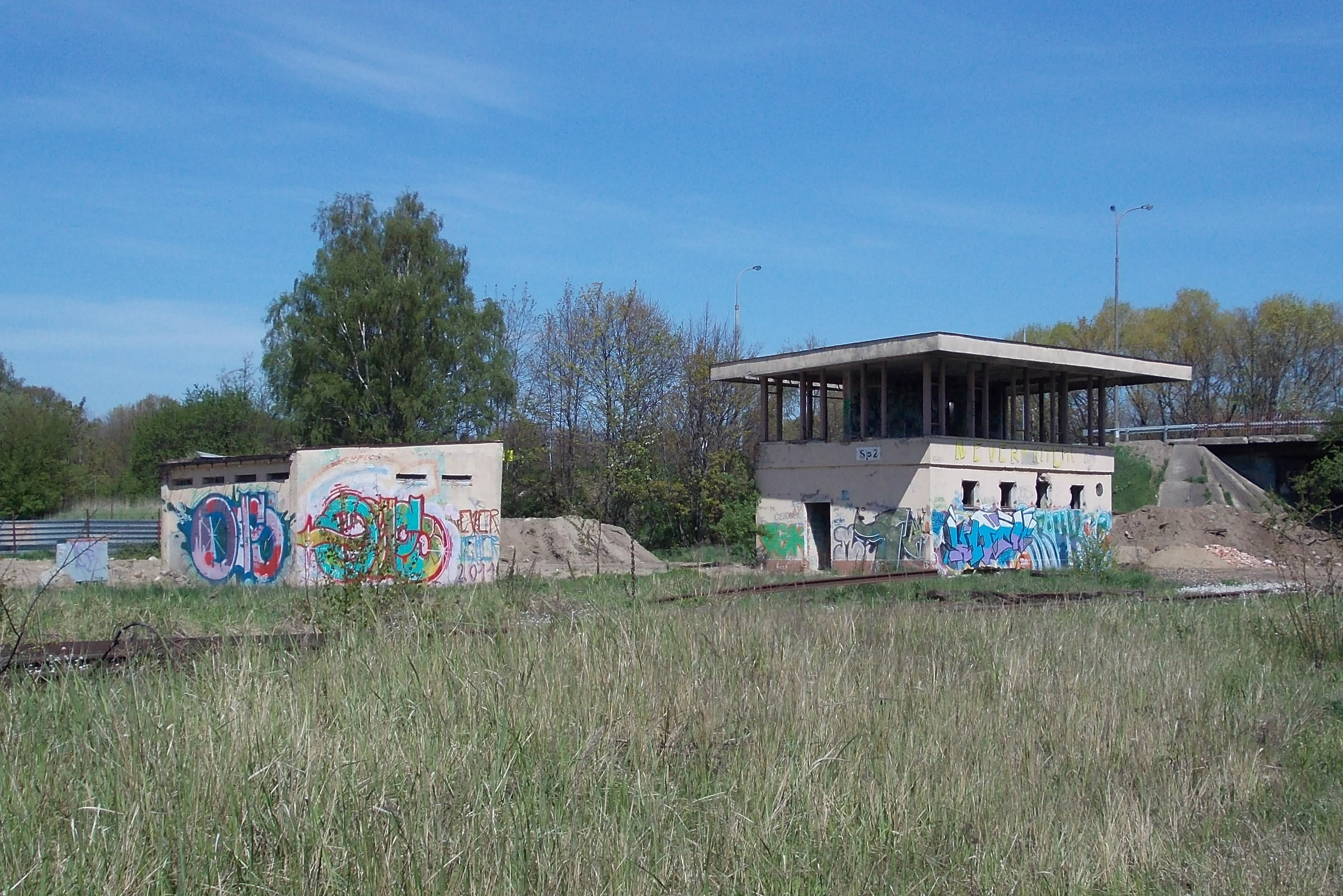 nastawnia ZP2 Gdańsk Zaspa Towarowa.